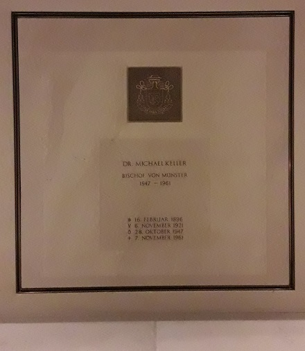 Grab von Bischof Michael Keller in der Bischofsgruft des Domes zu Münster/Westfalen, Deutschland